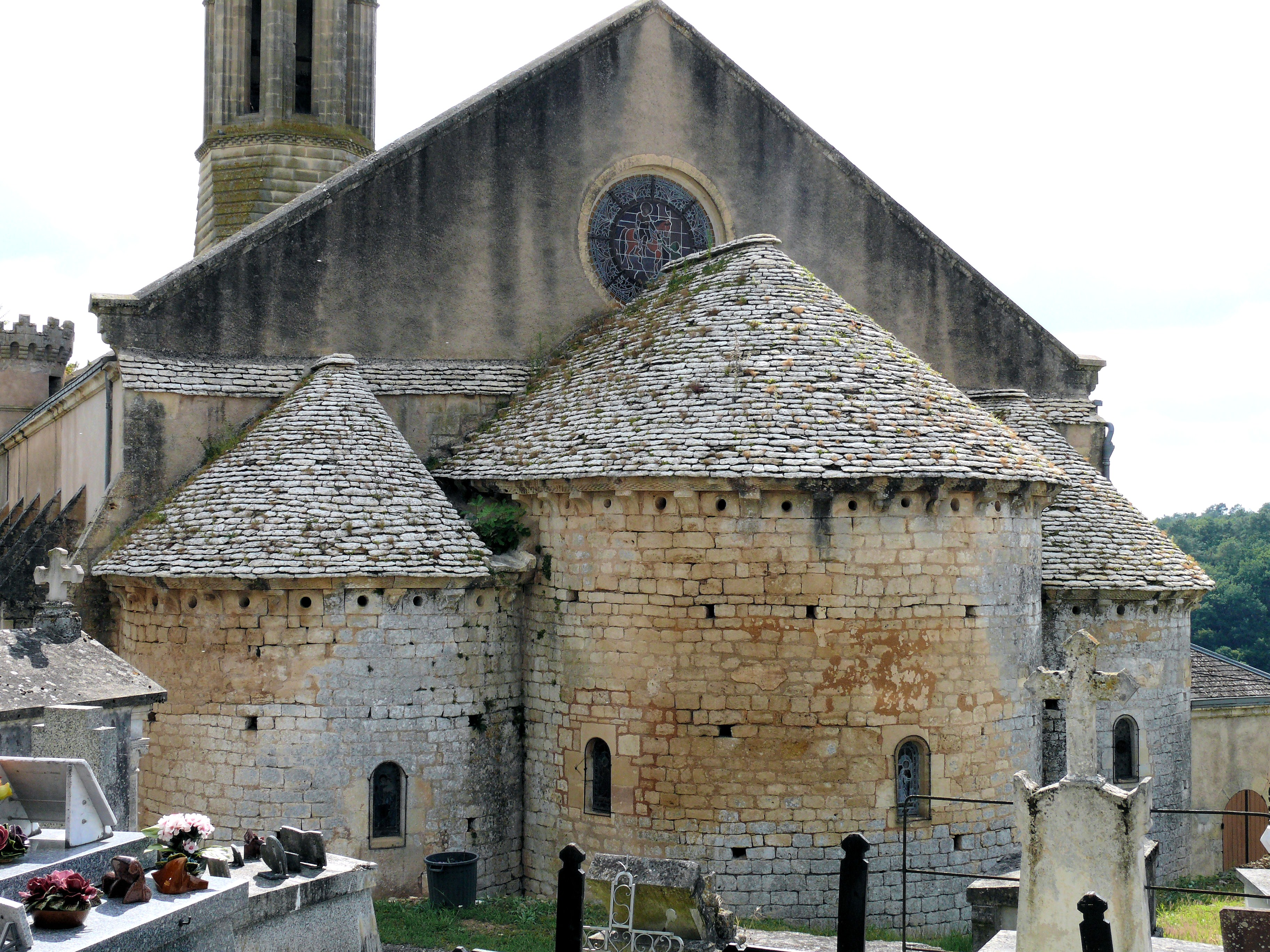 Cuzorn - Eglise Saint-Martin - Chevet roman